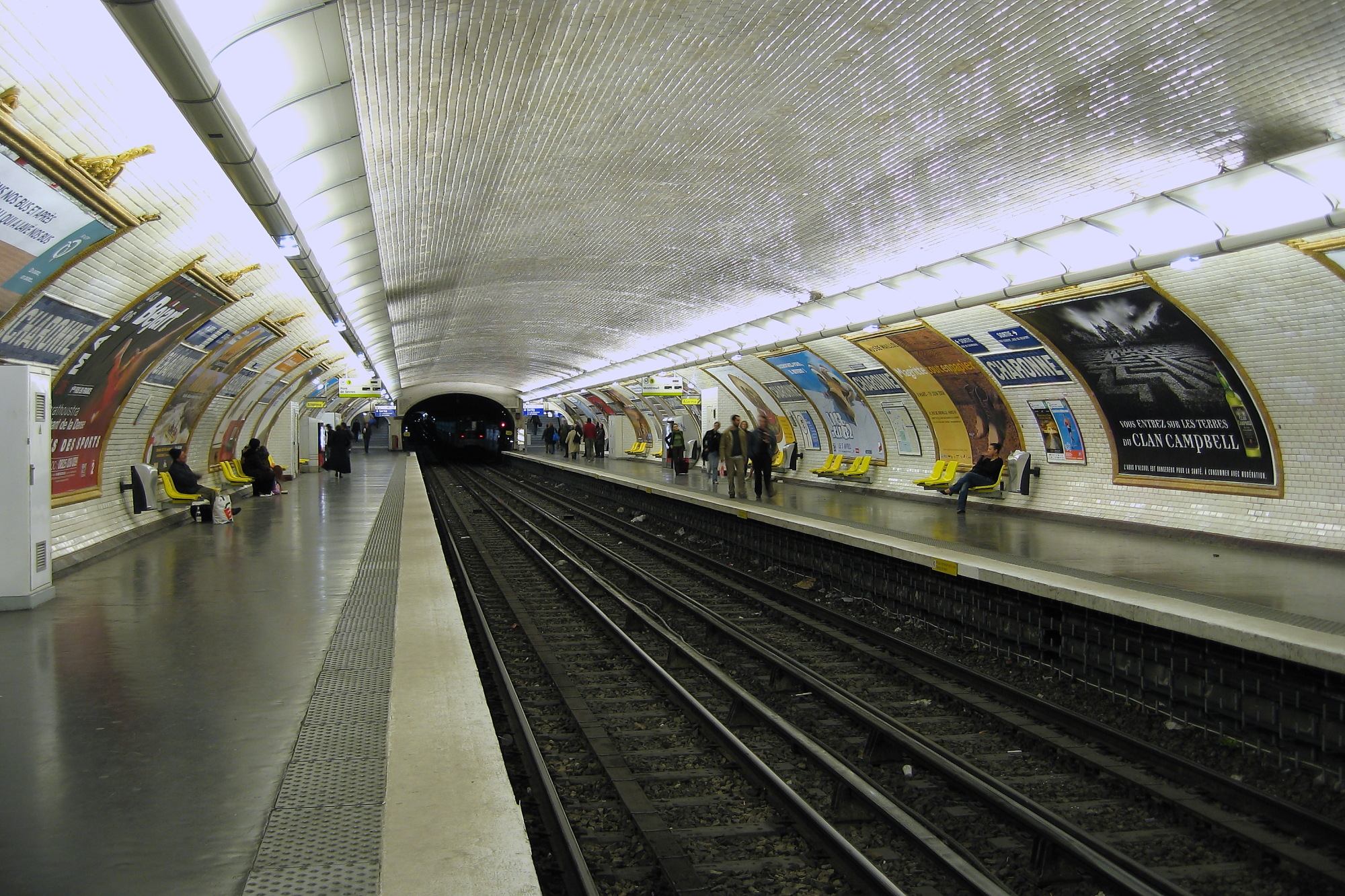 Quais de la station de métro parisienne Charonne, en direction de Montreuil.